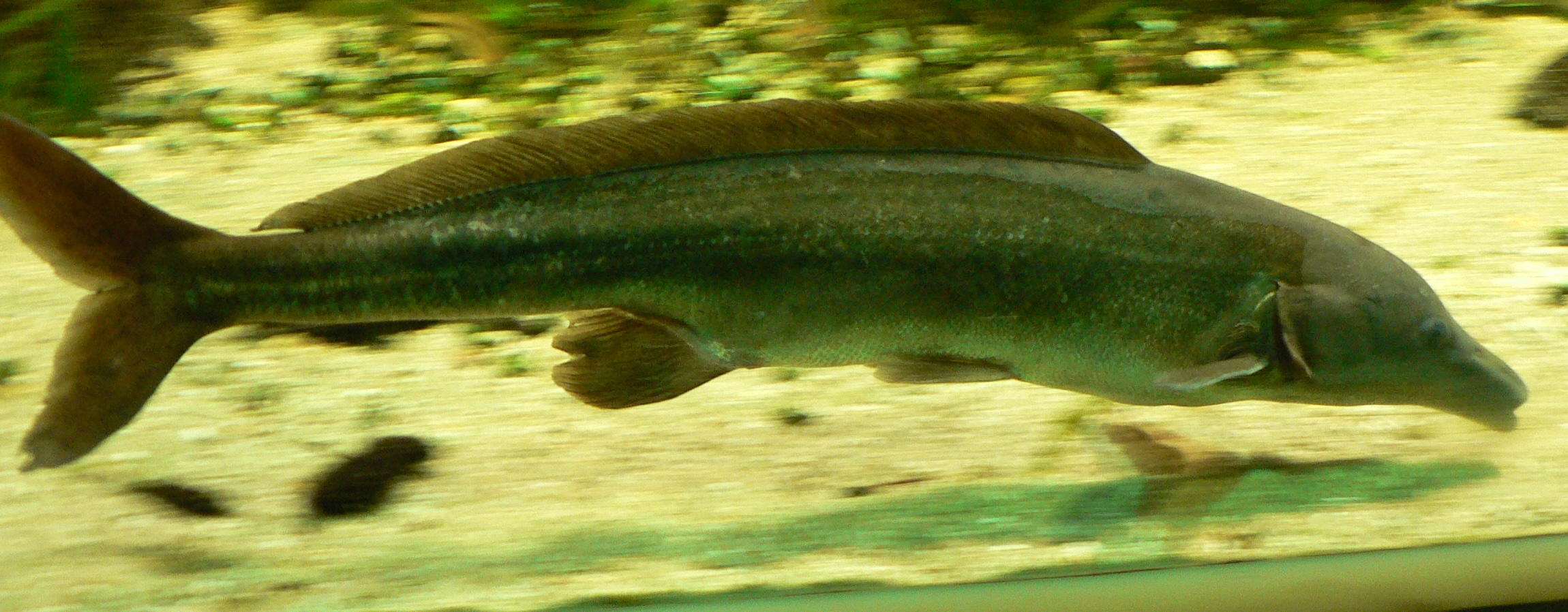 Mormyrus